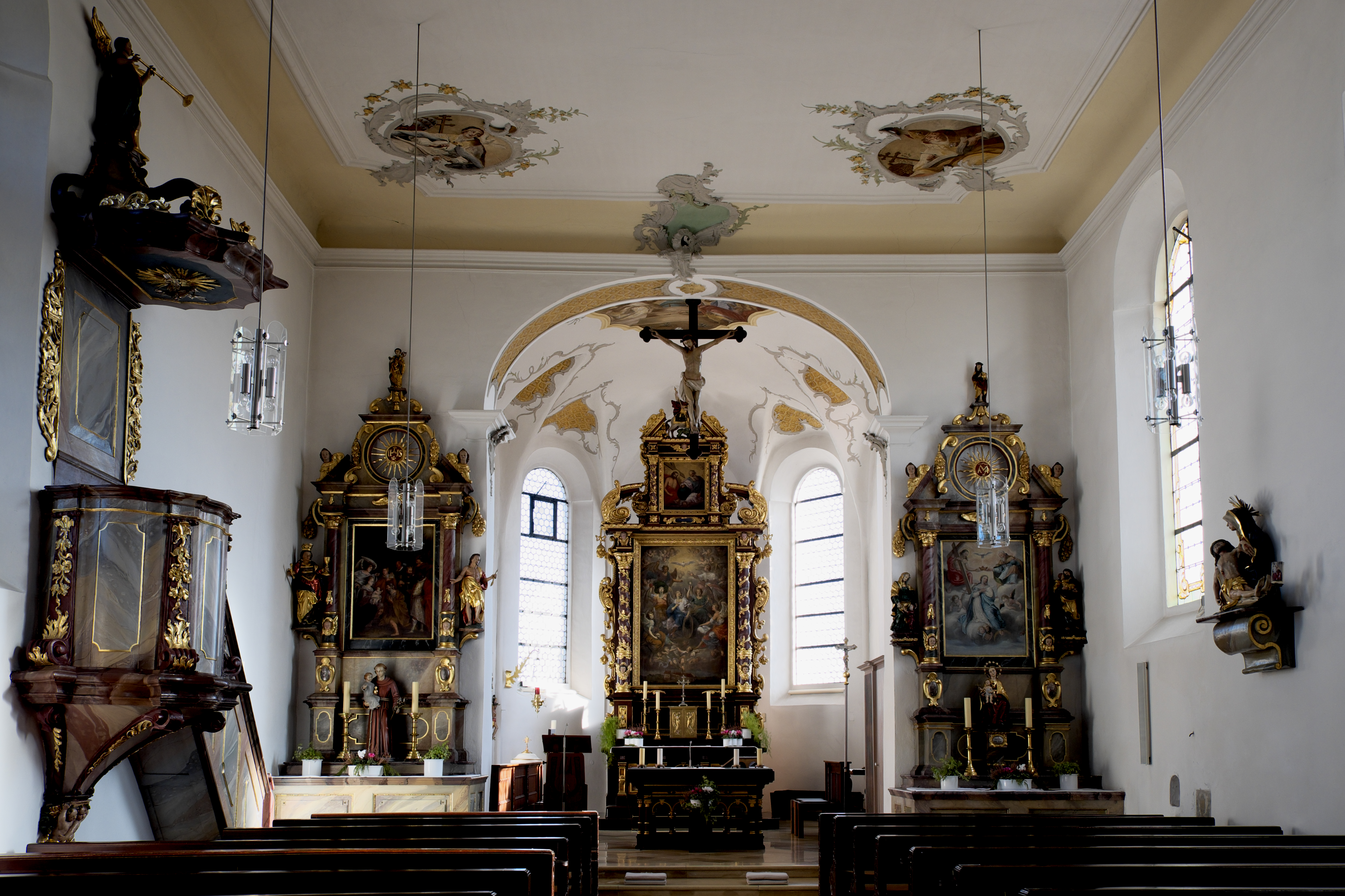 Katholische Pfarrkirche St. Georg in Hailtingen (Dürmentingen) im Landkreis Biberach (Baden-Württemberg/Deutschland), Innenraum